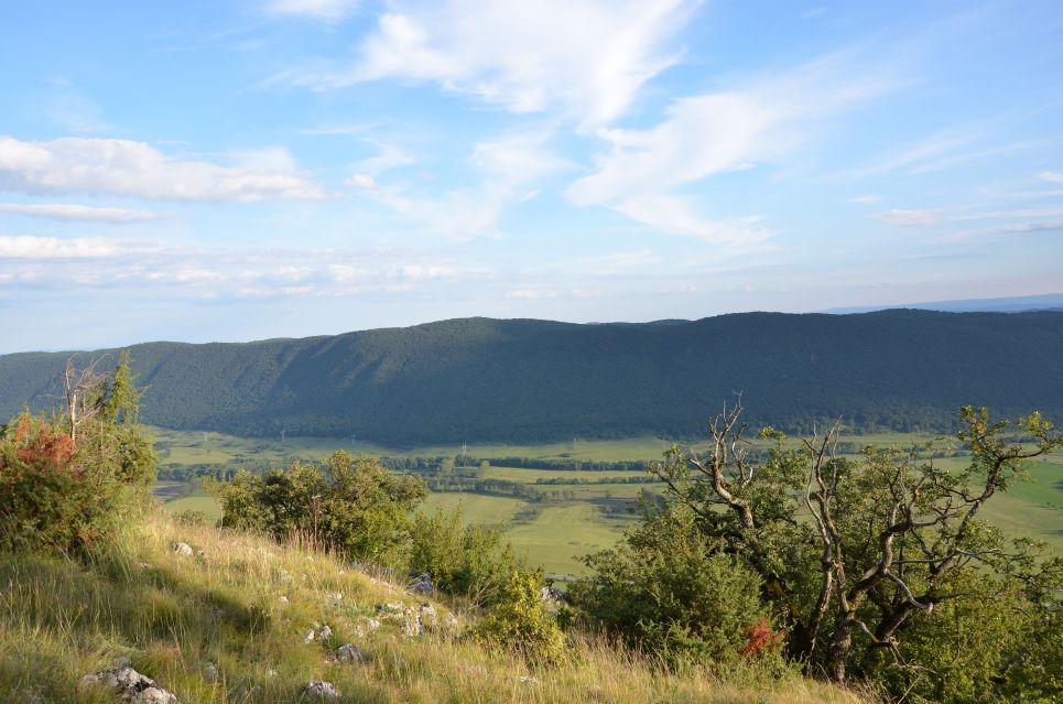 Planina Dolný vrch z planiny Horný vrch. V zábere centrálna časť masívu s tromi najvyššími vrcholmi: Žmeň (579 m n. m.; vľavo), Pavlovský vrch (611 m n. m.; uprostred) a Havraní vrch (574 m n. m.; vpravo). Dolu: Turnianska kotlina.